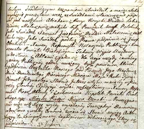 Akt darowizny nieruchomości ziemskiej dokonany przez właściciela majątku Małaszewicze Małe, wywodzącego się z tatarskiej rodziny porucznika Abrahama Koryckiego z 7 IX 1811 roku - strona 3